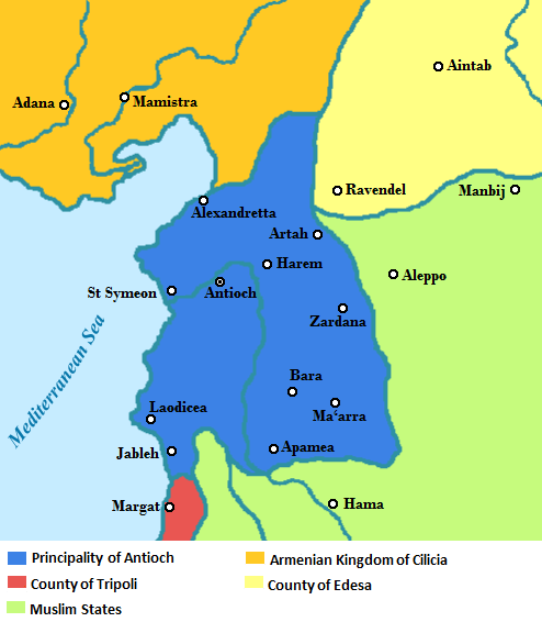 Principado de Antioquía hacia 1135.